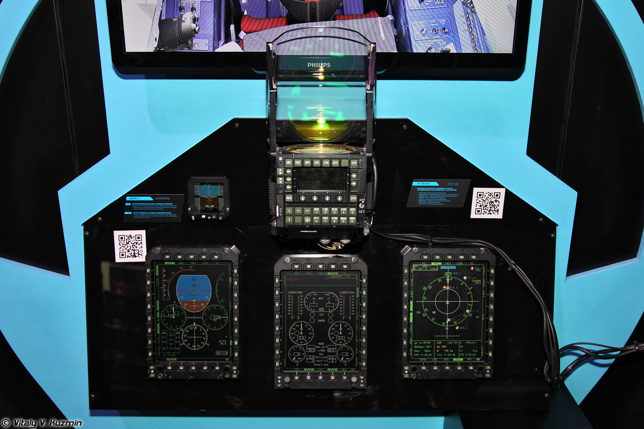 Комплект аппаратуры из состава комплекса бортового оборудования К-130.01 для самолета Як-130 (Parts of Yak-130 aircraft control and management system K-130.01)